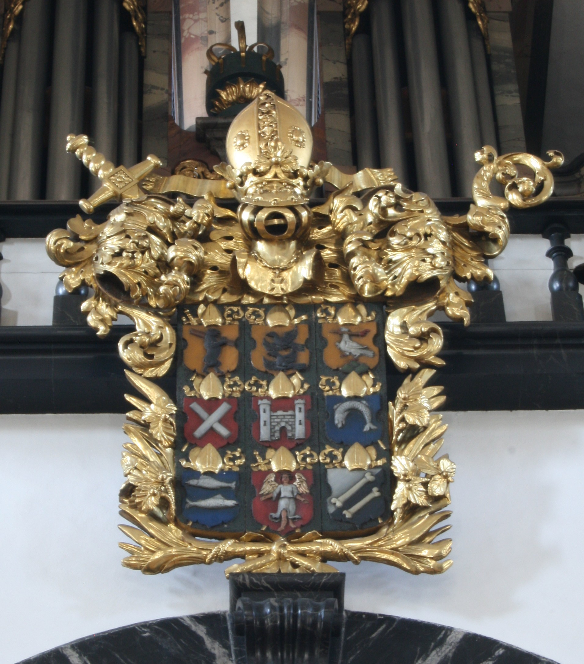 Pfarr- und Wallfahrtskirche Sachseln, Schweiz, Wappentafel an der Balustrade der hinteren Empore